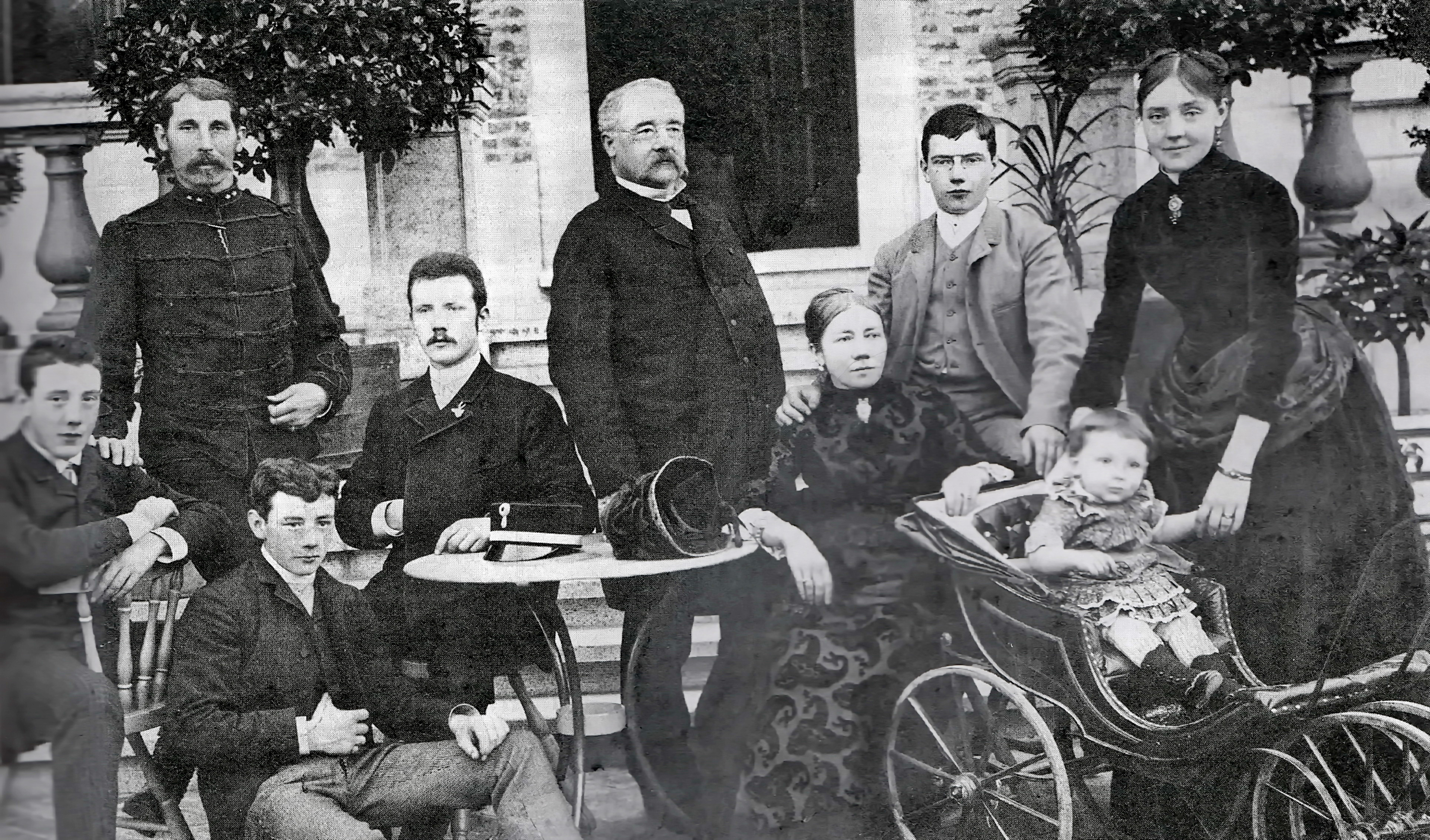 Familiebijeenkomst van de familie Brouwers-Regout op het terras voor Kasteel Nijswiller nabij Gulpen, Zuid-Limburg. Van links naar rechts: 1. Jules Brouwers (1869-1955); 2. Philippe Tielens sr., kapitein der cavalerie en echtgenoot van Francisca Brouwers, nr. 9 (1855-1916); 3. Paul Brouwers (1867-1923); 4. Hubert Brouwers jr. (1866-1935); 5. Hubert Brouwers sr. (1833-1892); 6. Émelie Brouwers-Regout (1834-1886); 7. Léon Brouwers (1871-1951); 8. Philippe Tielens jr. (1885-?); 9. Francisca Brouwers (1863-1919).